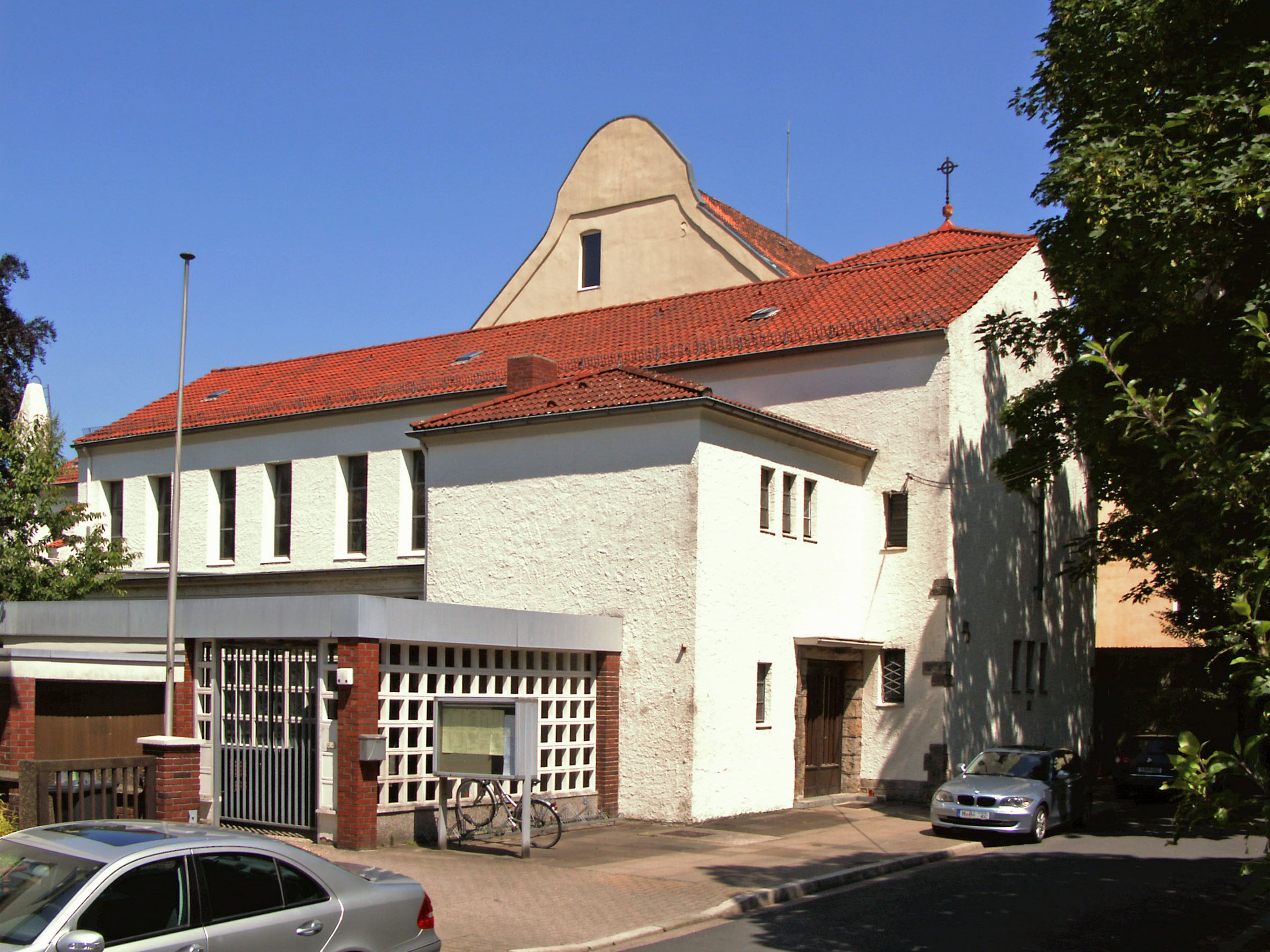 Katholische Kirche St. Bruder Konrad in Hannover, Stadtteil List (2013 profaniert).